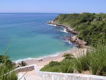 playa carrizalillo